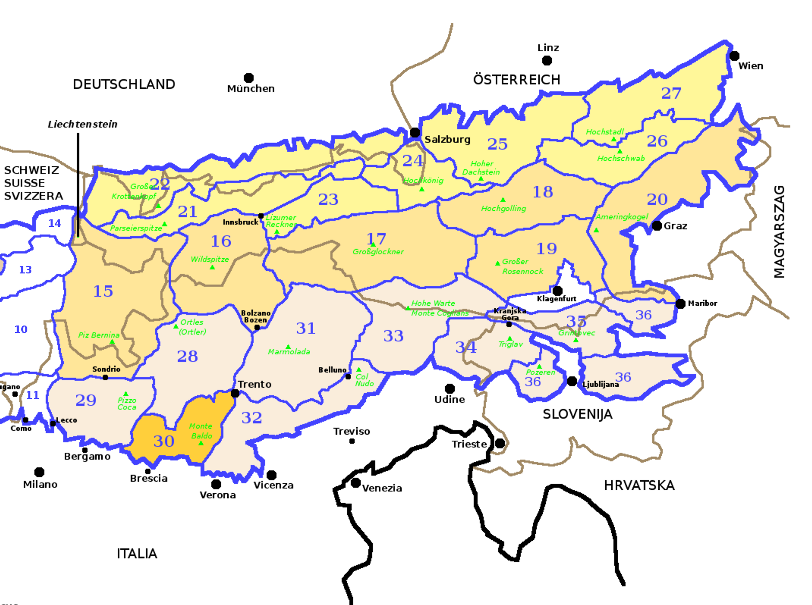 Alpi Orientali secondo la SOIUSA con evidenziate le Prealpi Bresciane e Gardesane